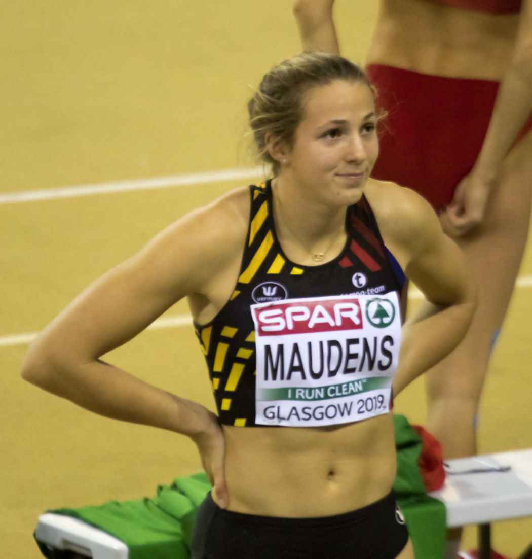 EKI10059 maudens hoog